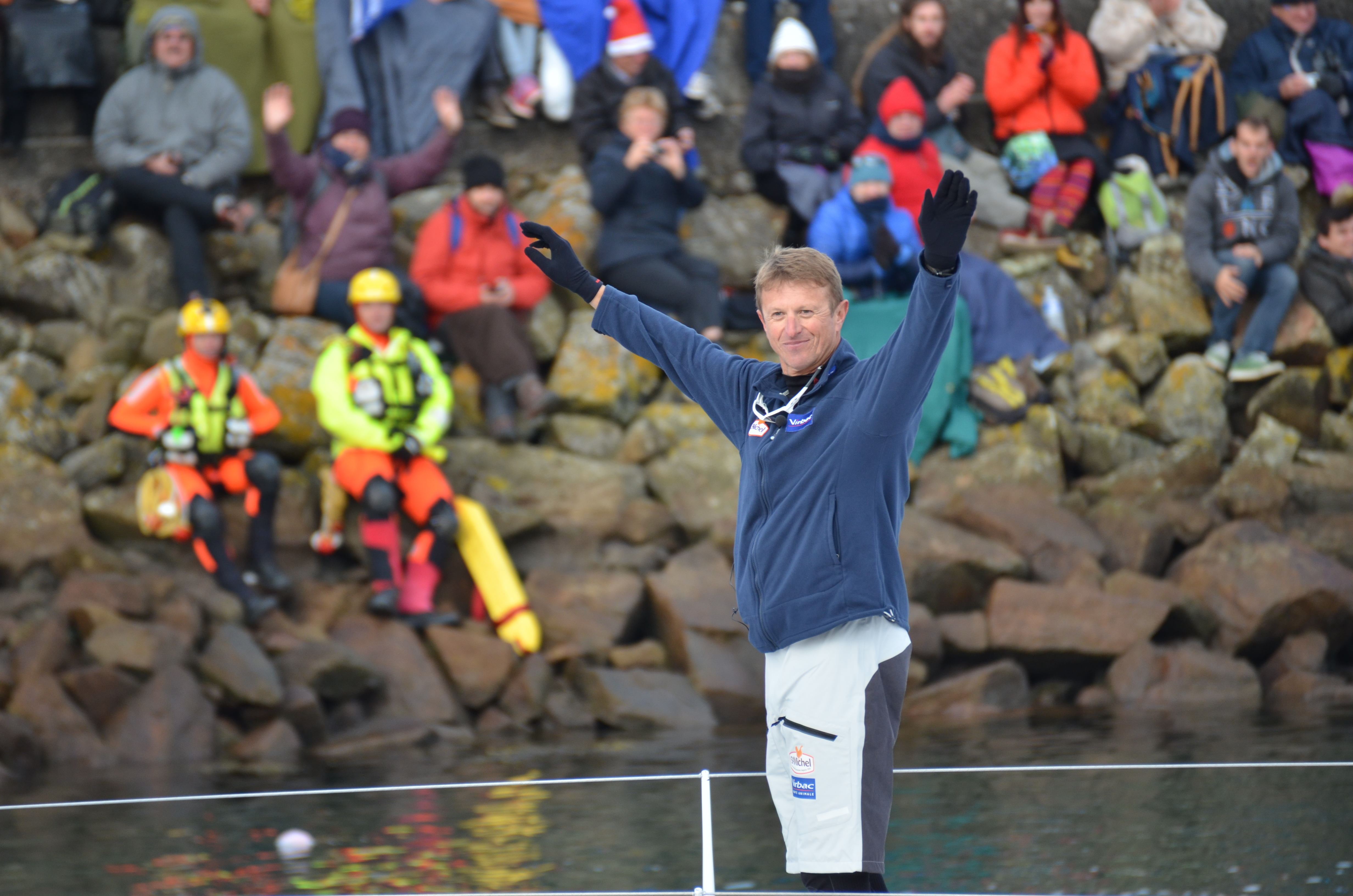 Jean Pierre Dick au départ du Vendée Globe 2016-2017